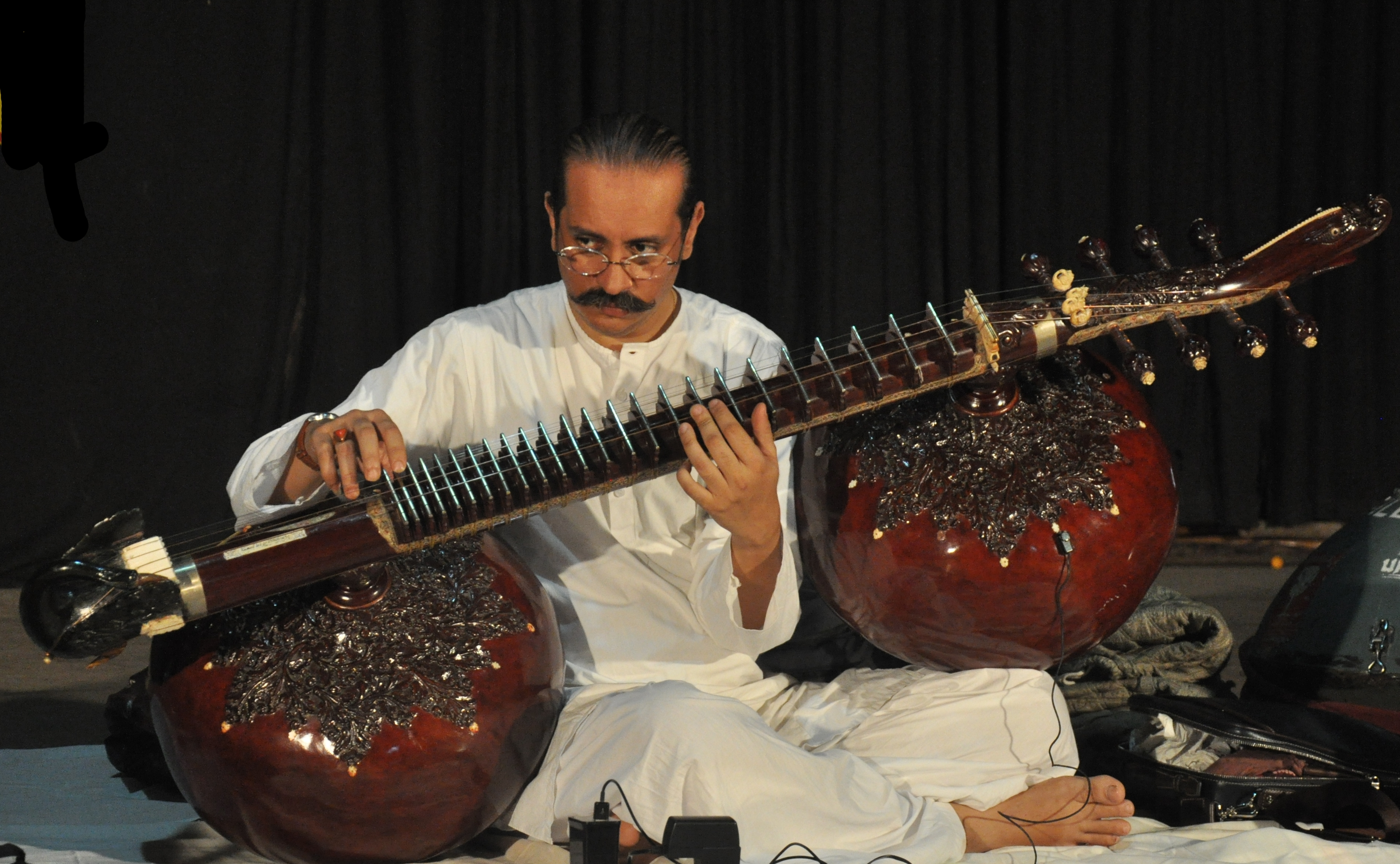 ഇന്ത്യയിലെ പ്രശസ്തനായ ഒരു രുദ്രവീണ വാദകനാണ്ബഹാവുദ്ദീൻ മൊഹിയുദ്ദീൻ ദാഗർ